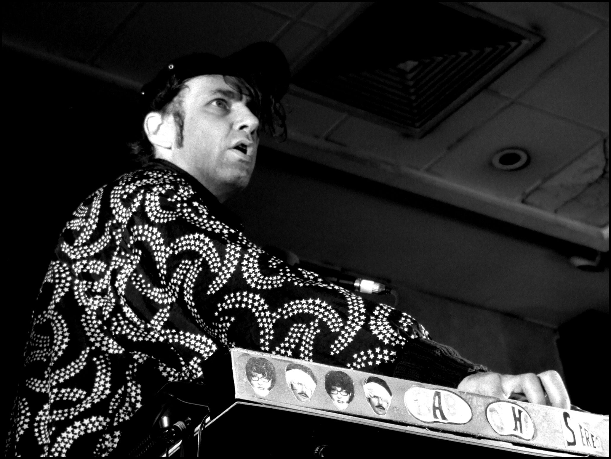 Brezel Göring: Stereo Total @ Salon Covadonga, 2010